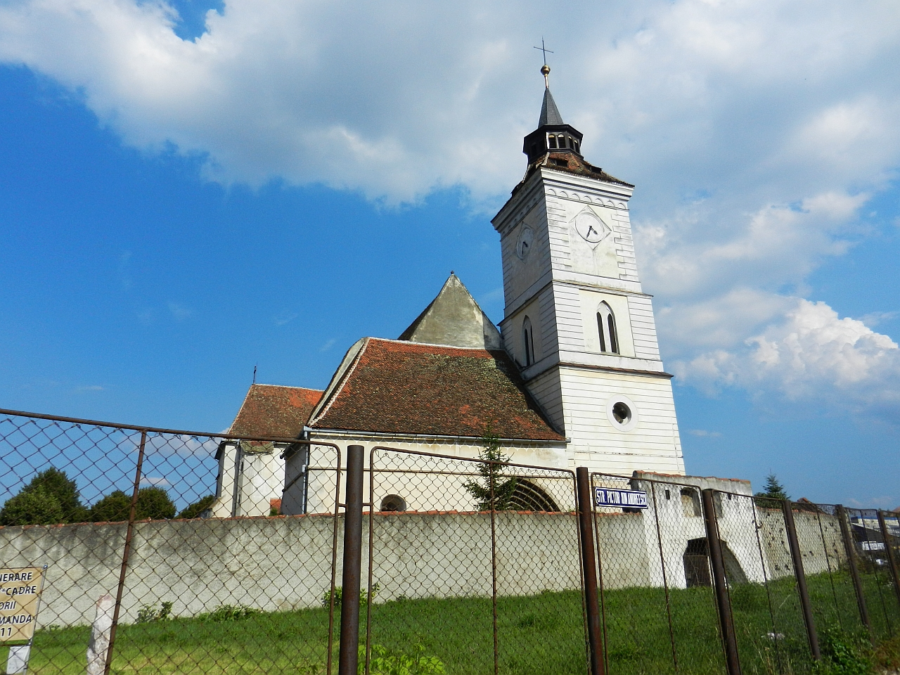 Zid de incintă cu poartă 03